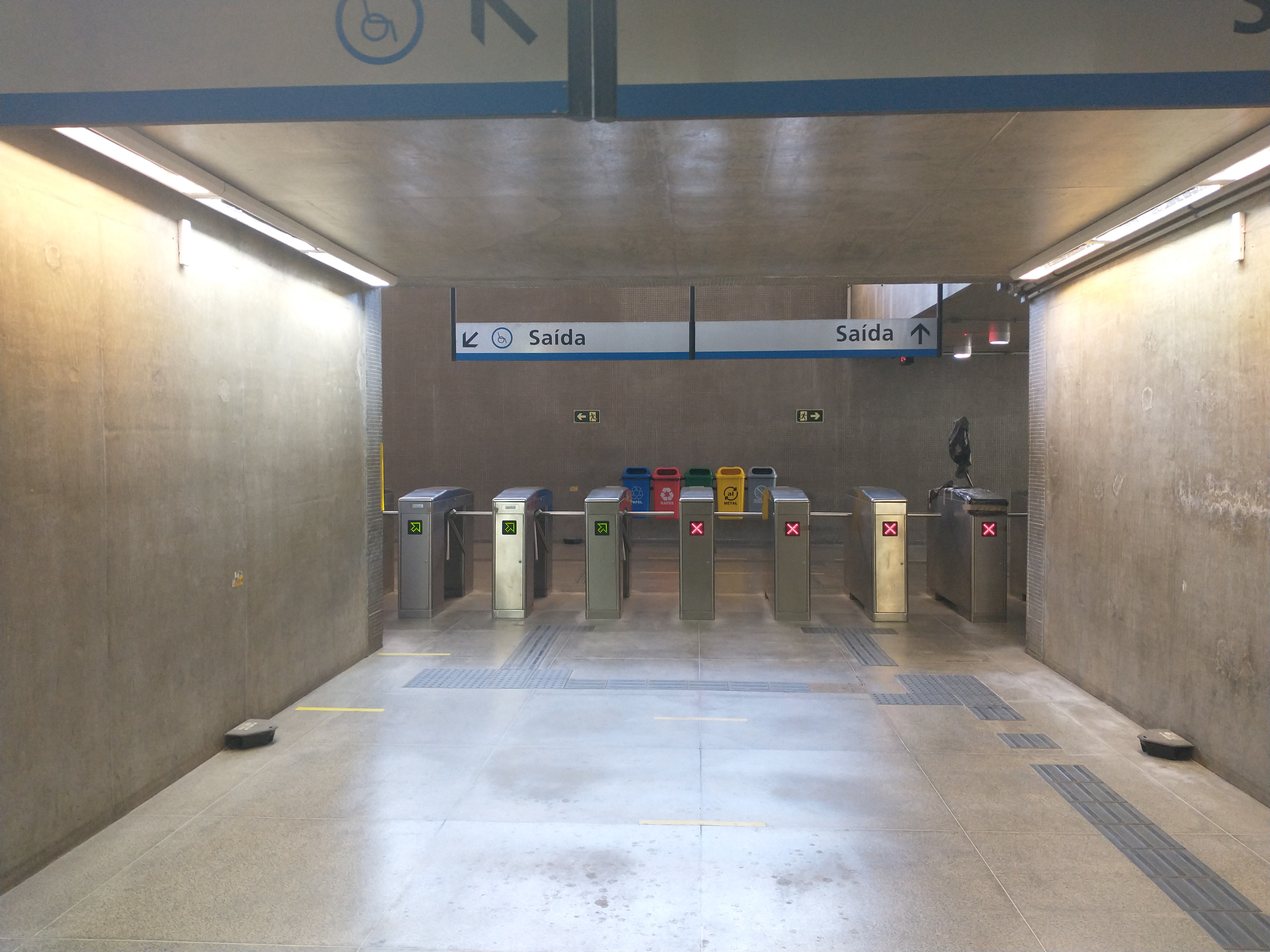 Acessos com os bloqueios no subsolo da estação Vila Pery. Estação de superfície, com acessos subterrâneos, de plataforma central e estrutura em concreto aparente. Pertence a Linha Sul do sistema de Metrô da cidade de Fortaleza, capital do Ceará, Brasil.